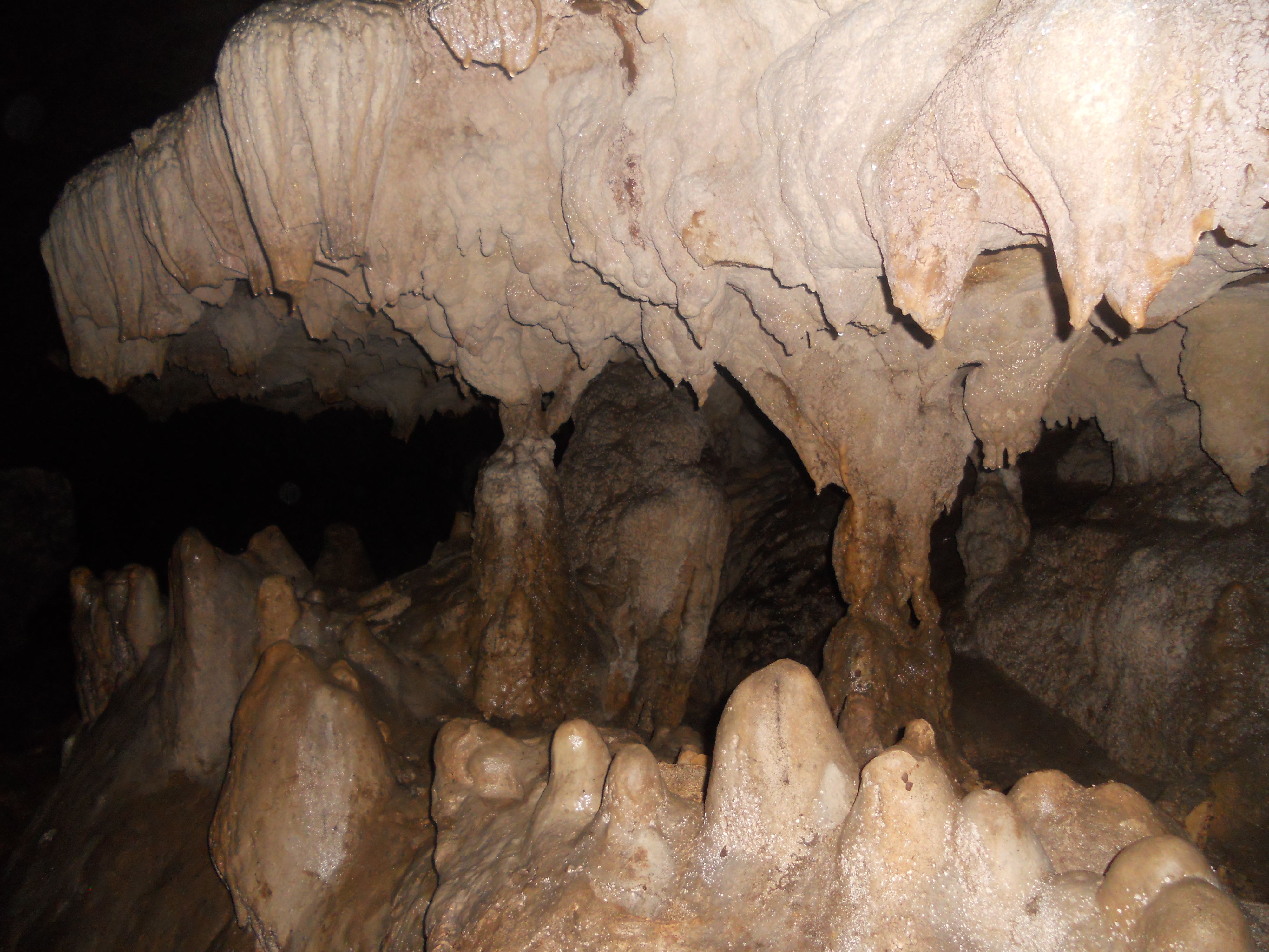 Shpella e Pëllumbasit